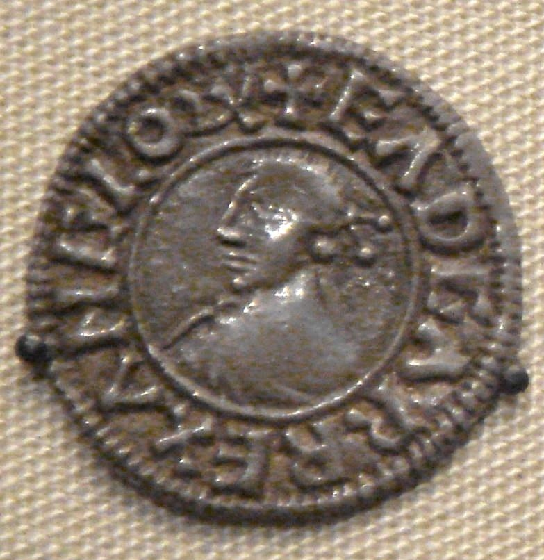 Monnaie d'Edgar d'Angleterre (r. 959-975)